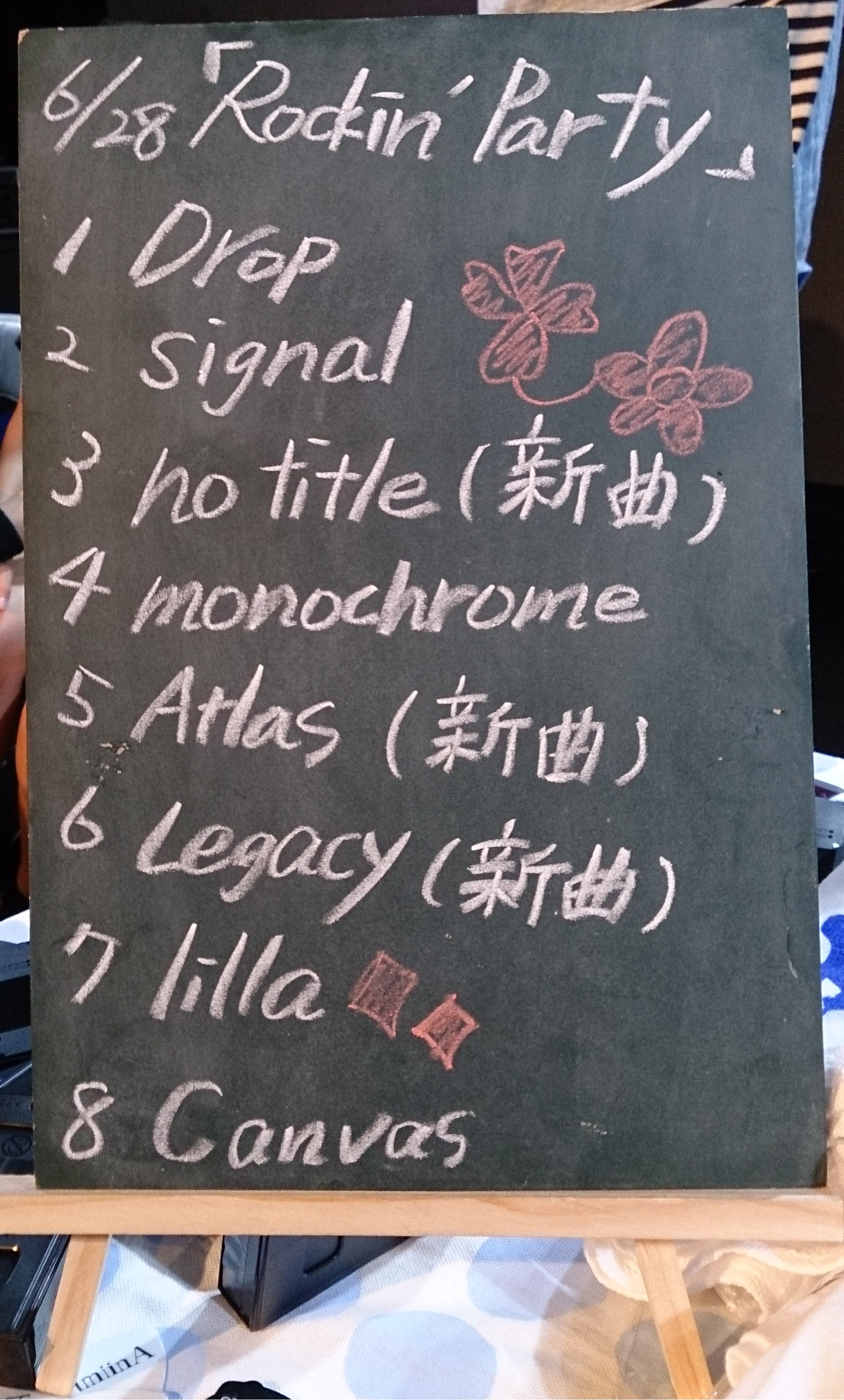 amiinAセトリボード(20160628(1))